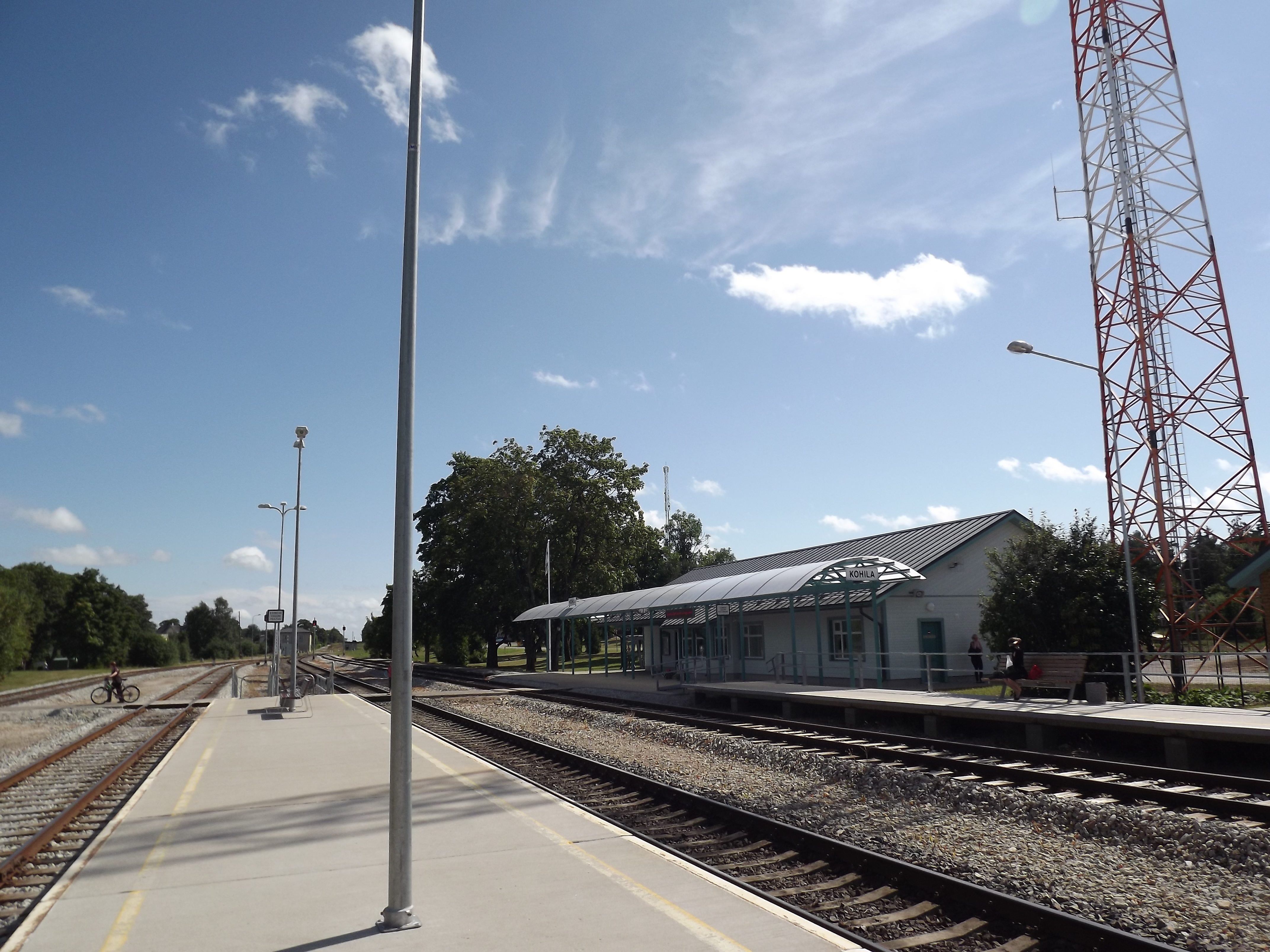 Kohila raudteejaam